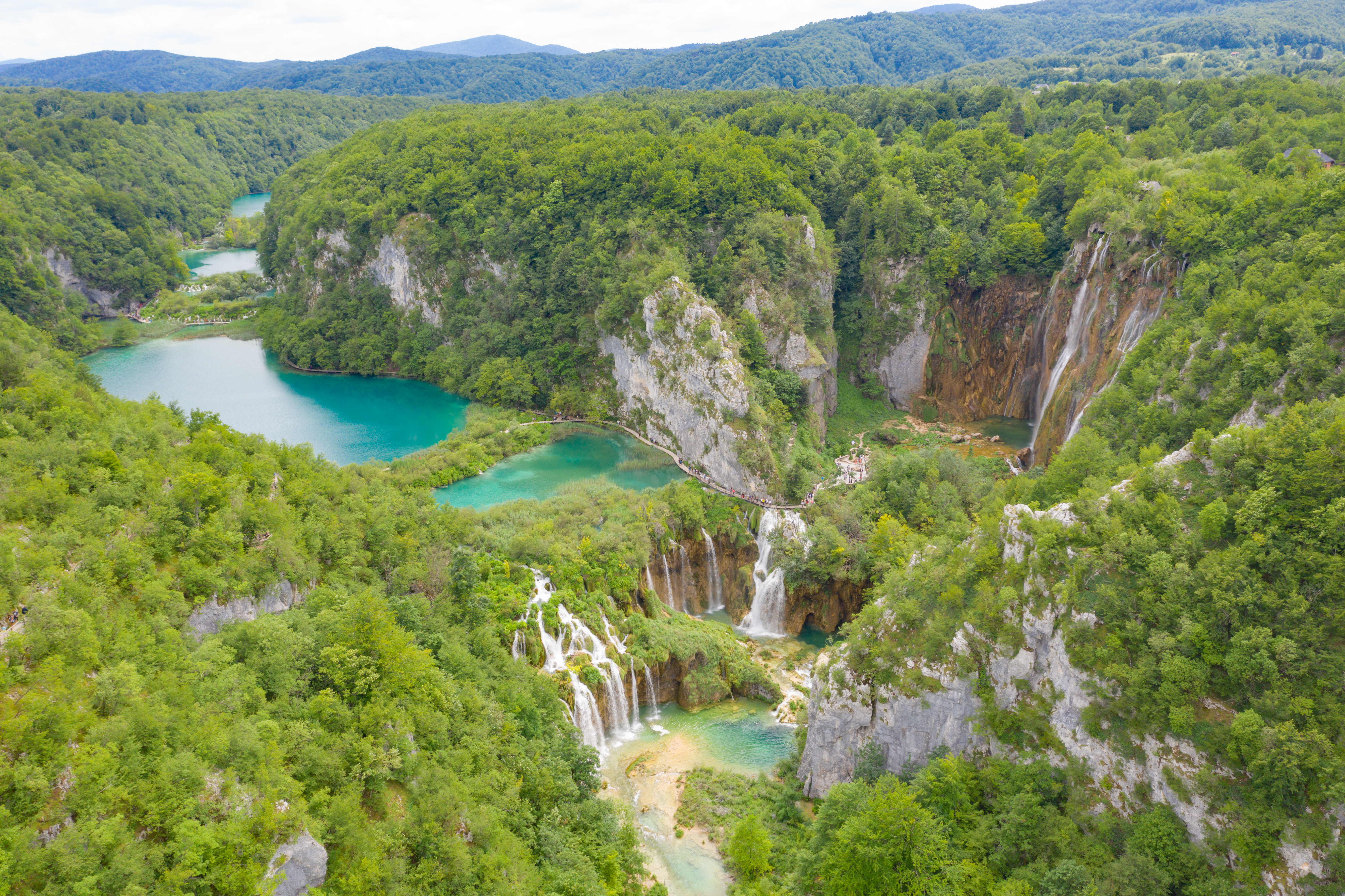 Luftbild vom Bach Plitvice und dem großen Wasserfall in Kroatien